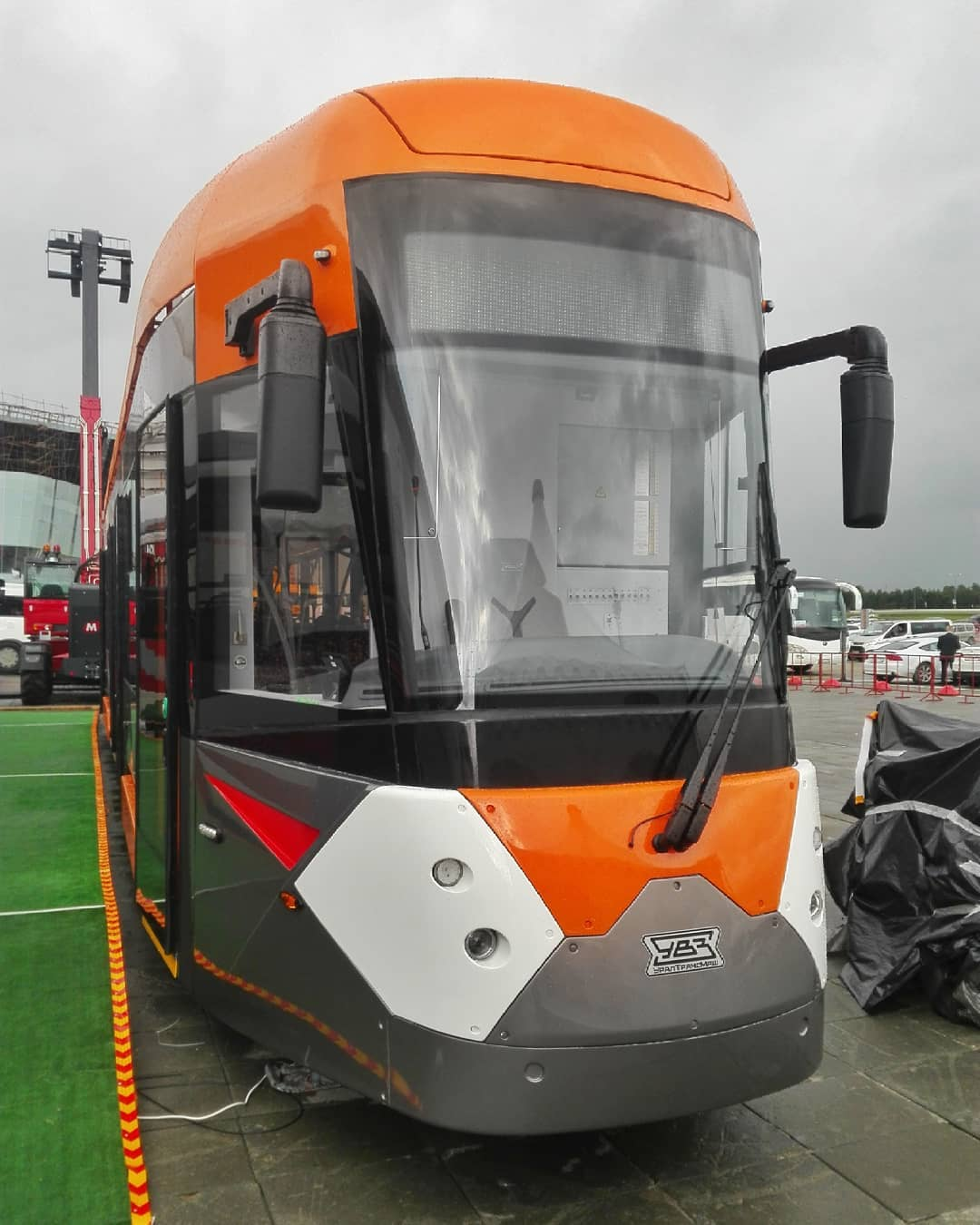 71-415 на выставке ИННОПРОМ-2018 в Екатеринбурге.